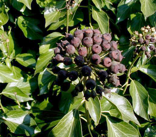 Hedera helix